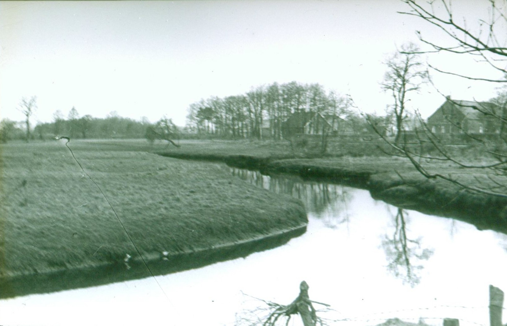 Sater-Ems, 1931